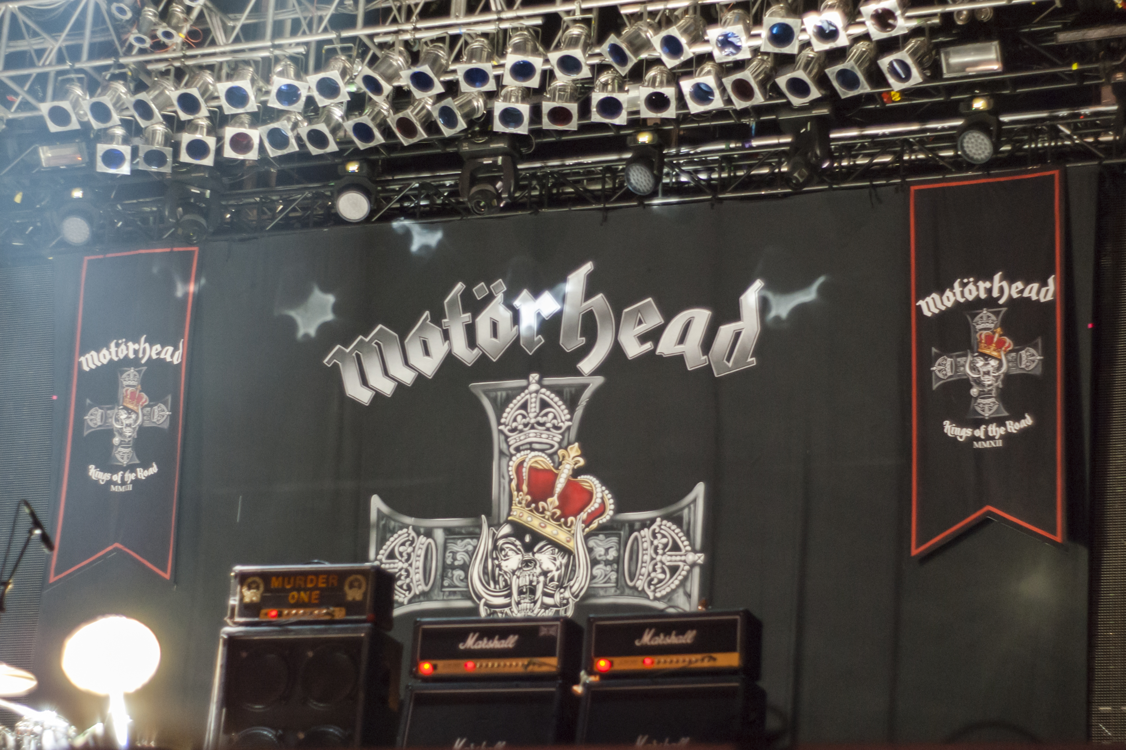 Zespół Motorhead i ich niezmienne logo podczas festiwalu Ursynalia 2013